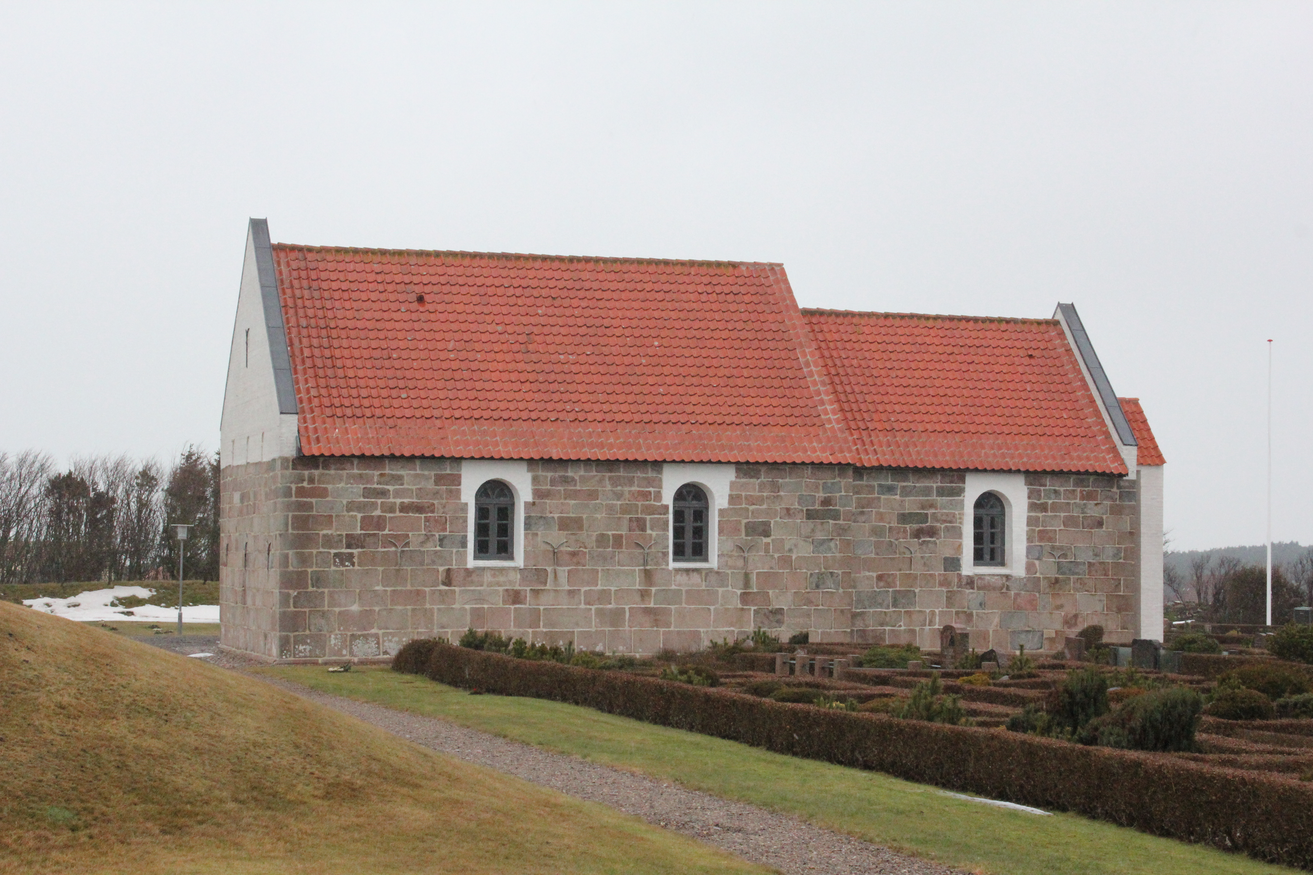 Hansted Kirke i Hanstholm